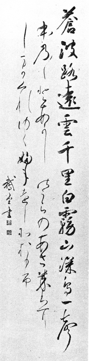 小野鷲堂 筆 朗詠